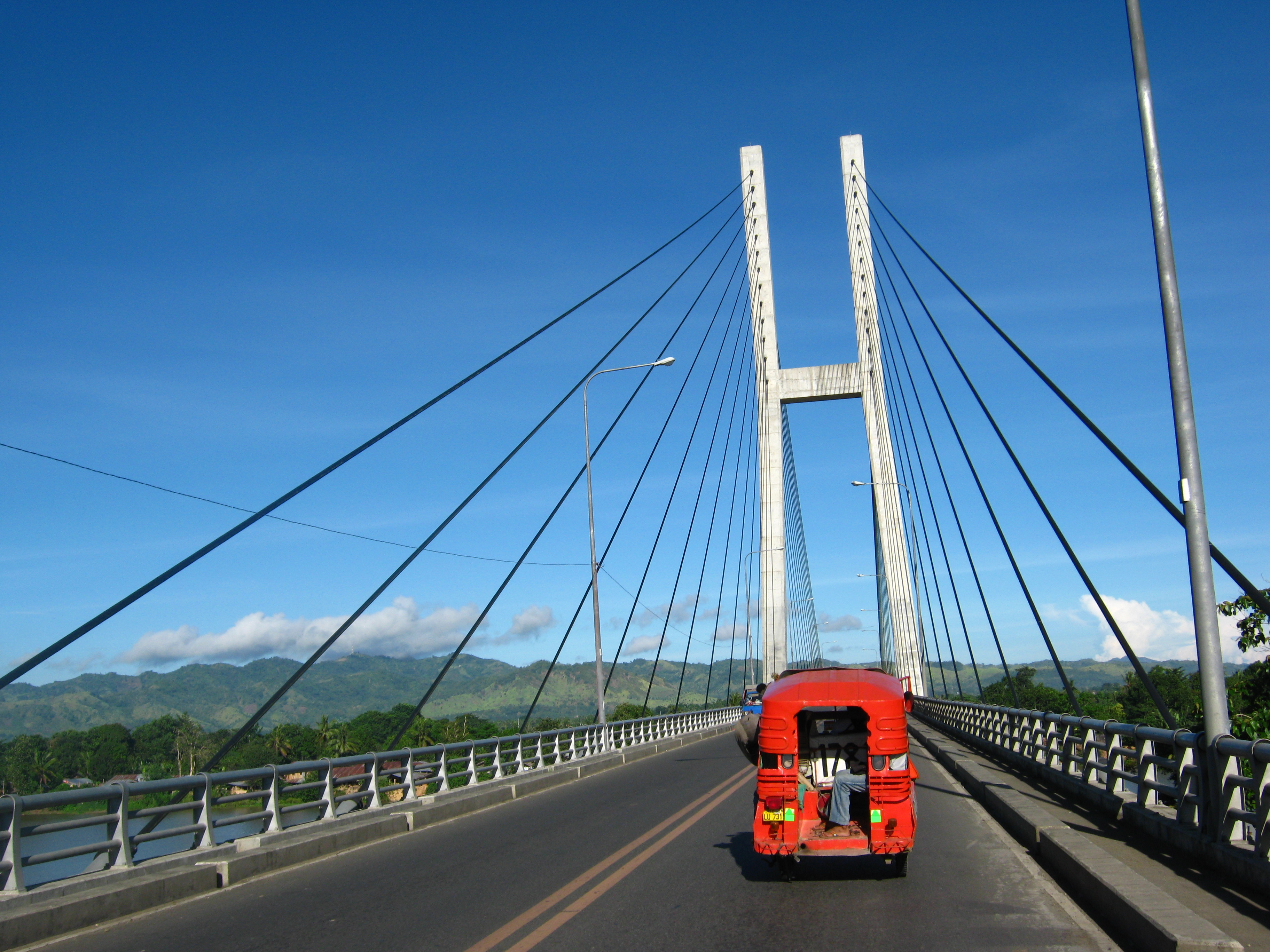 @ D. Macapagal Bridge